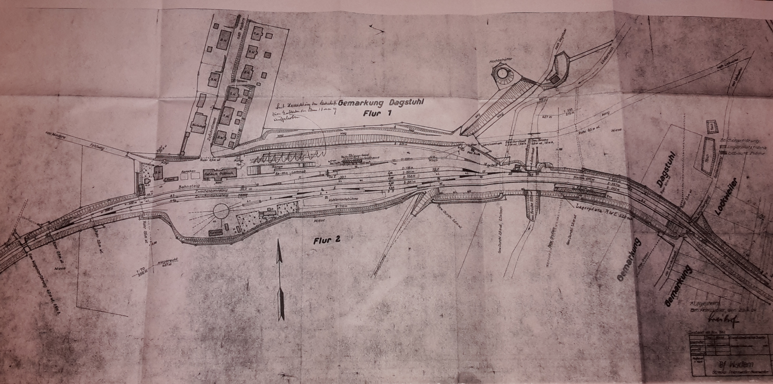 Gleisplan des Waderner Bahnhofs 1952